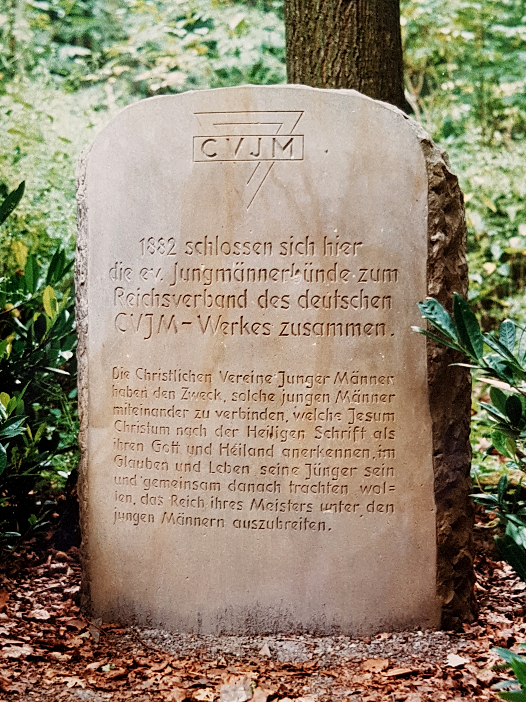 Gedenkstein zur Gründung des deutschen CVJM-Nationalverbandes im Jahr 1882 hier am Hermannsdenkmal